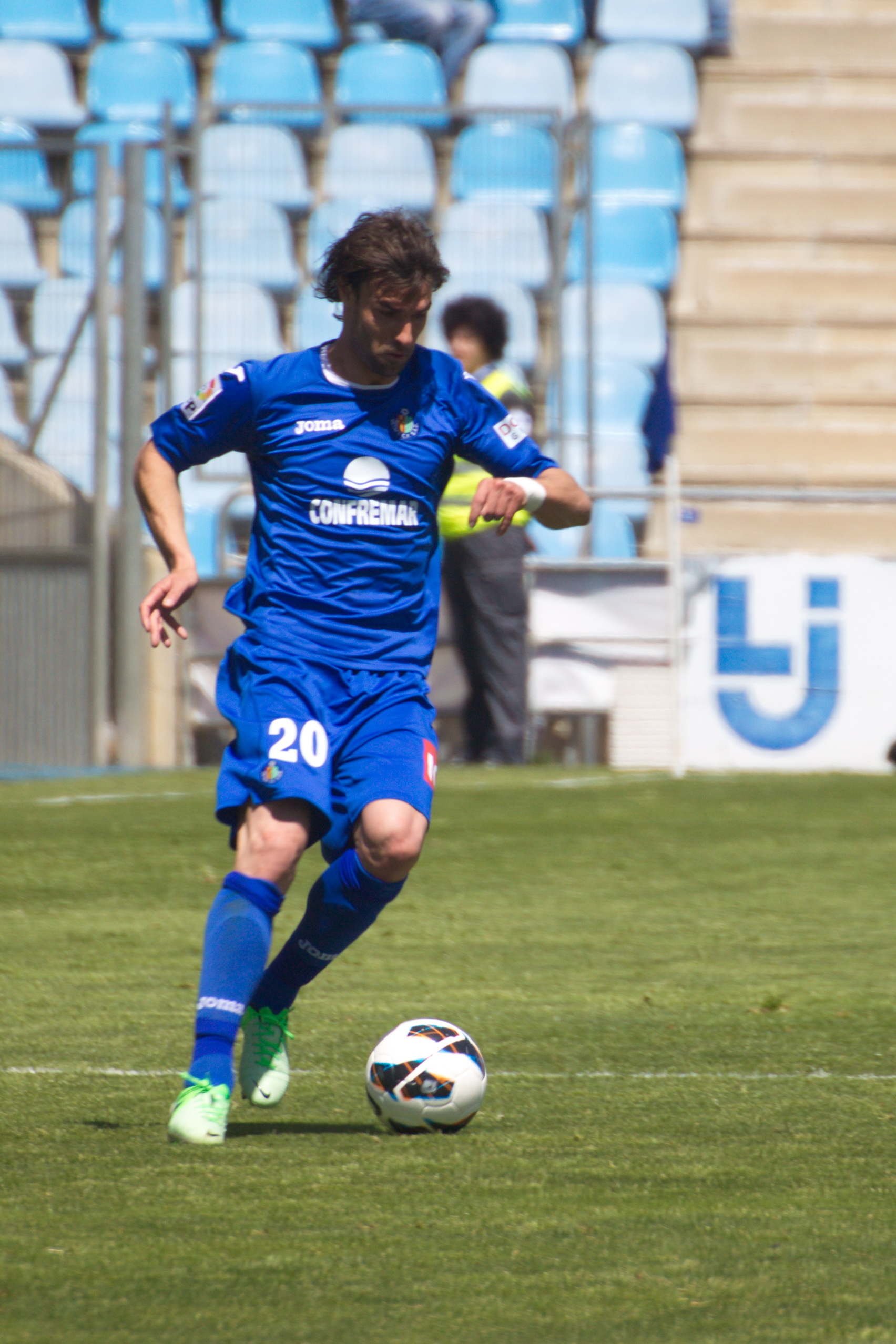 Juan Valera Espín (Bullas, Región de Murcia, España, 21 de diciembre de 1984) es un futbolista español. Juega de defensa en el lateral derecho. Partido celebrado el 21-04-2013 entre el Getafe C.F. - R.C.D. Español correspondiente a La Liga.